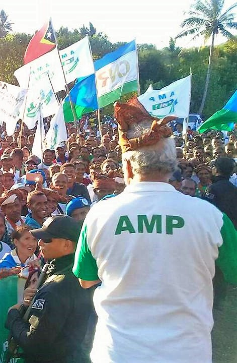 Xanana Gusmão bei einer Wahlkampfveranstaltung der AMP in Oesilo, Oecusse, Osttimor